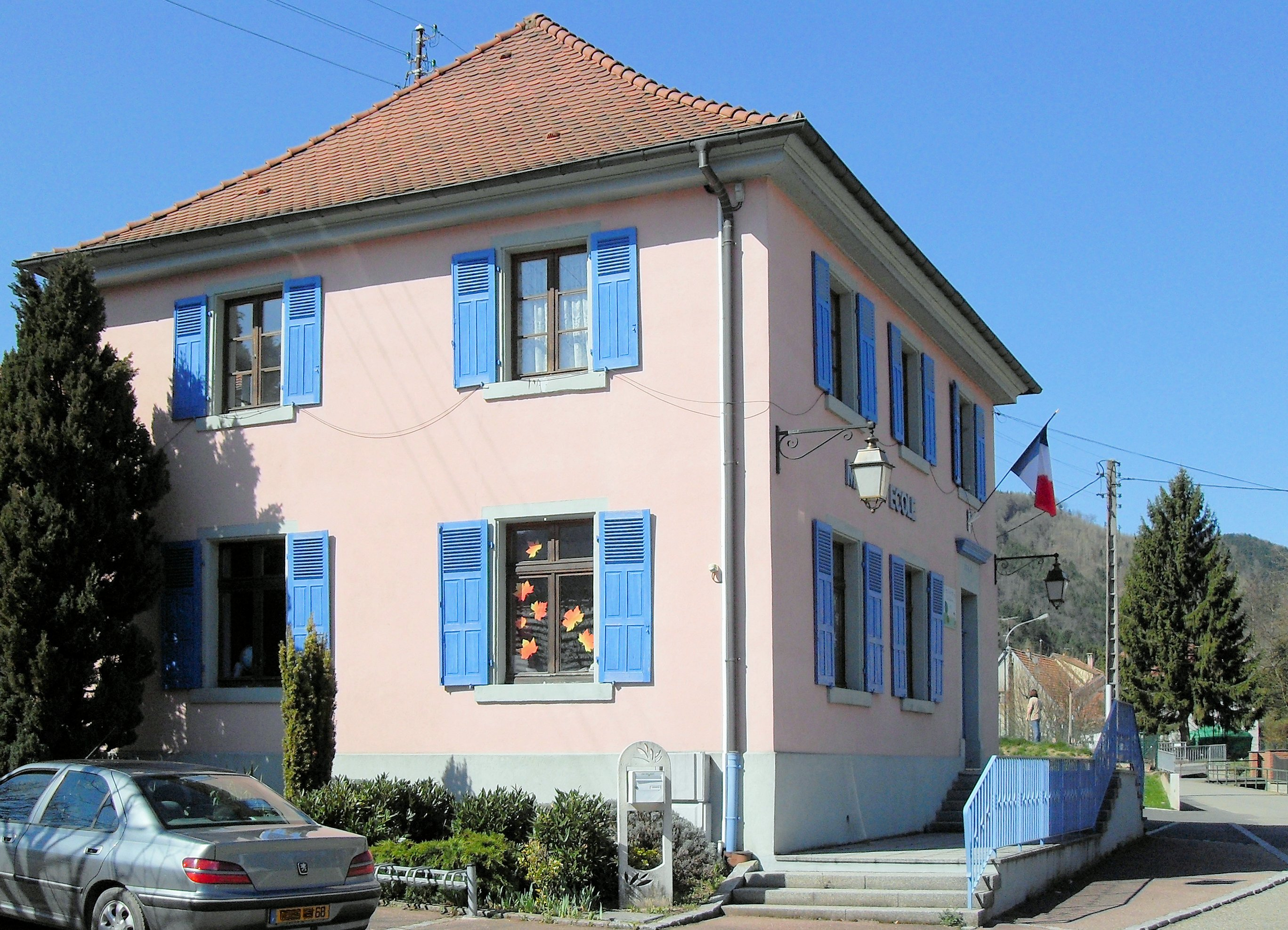 La mairie-école de Sickert